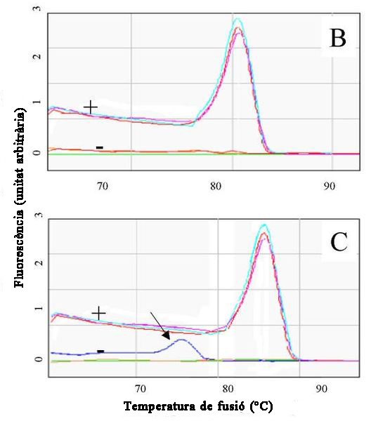 gràfica del proces de la PCR